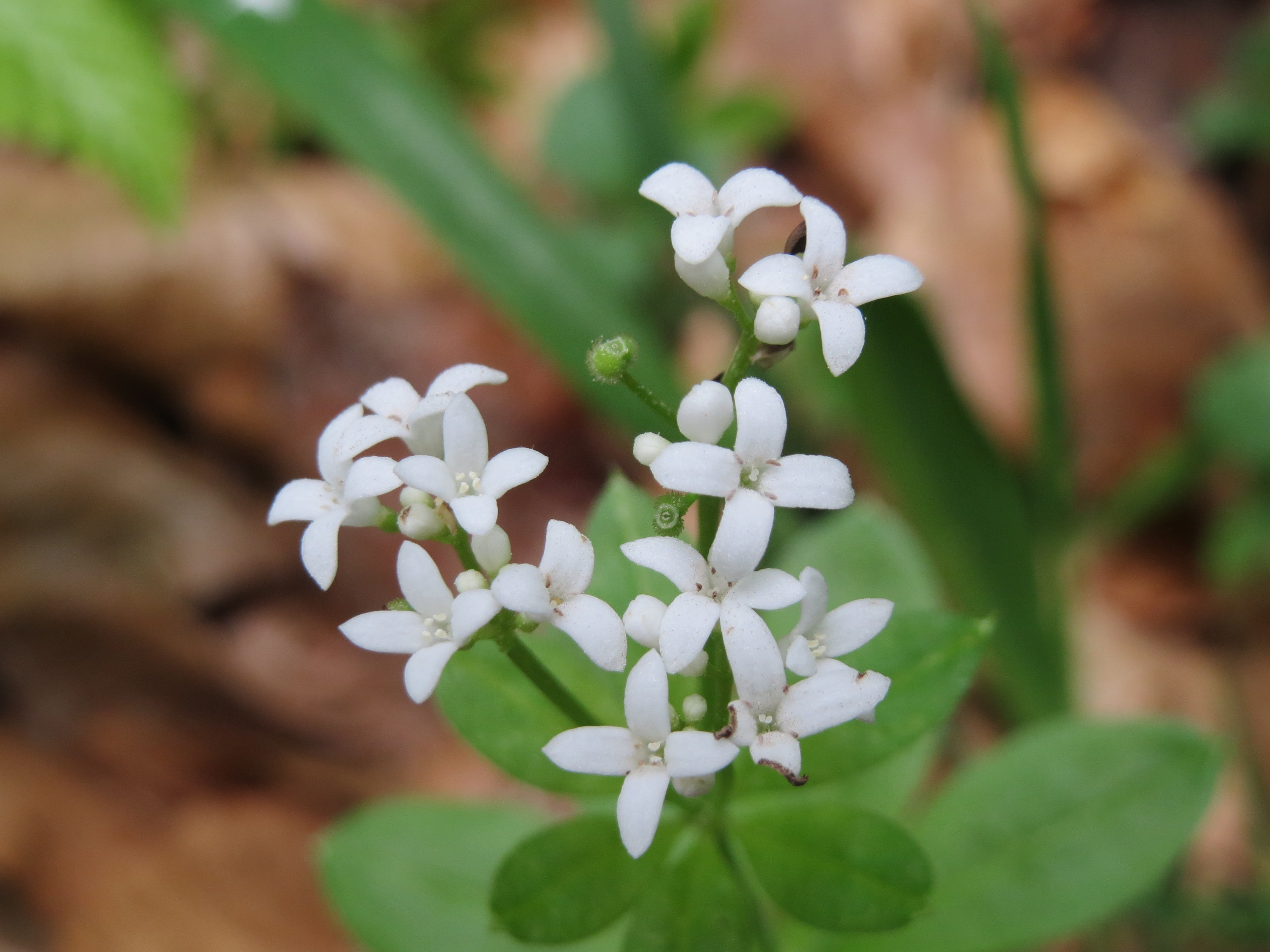 Waldmeister (Galium odoratum) im Waldschutzgebiet "Schwetzinger Hardt"